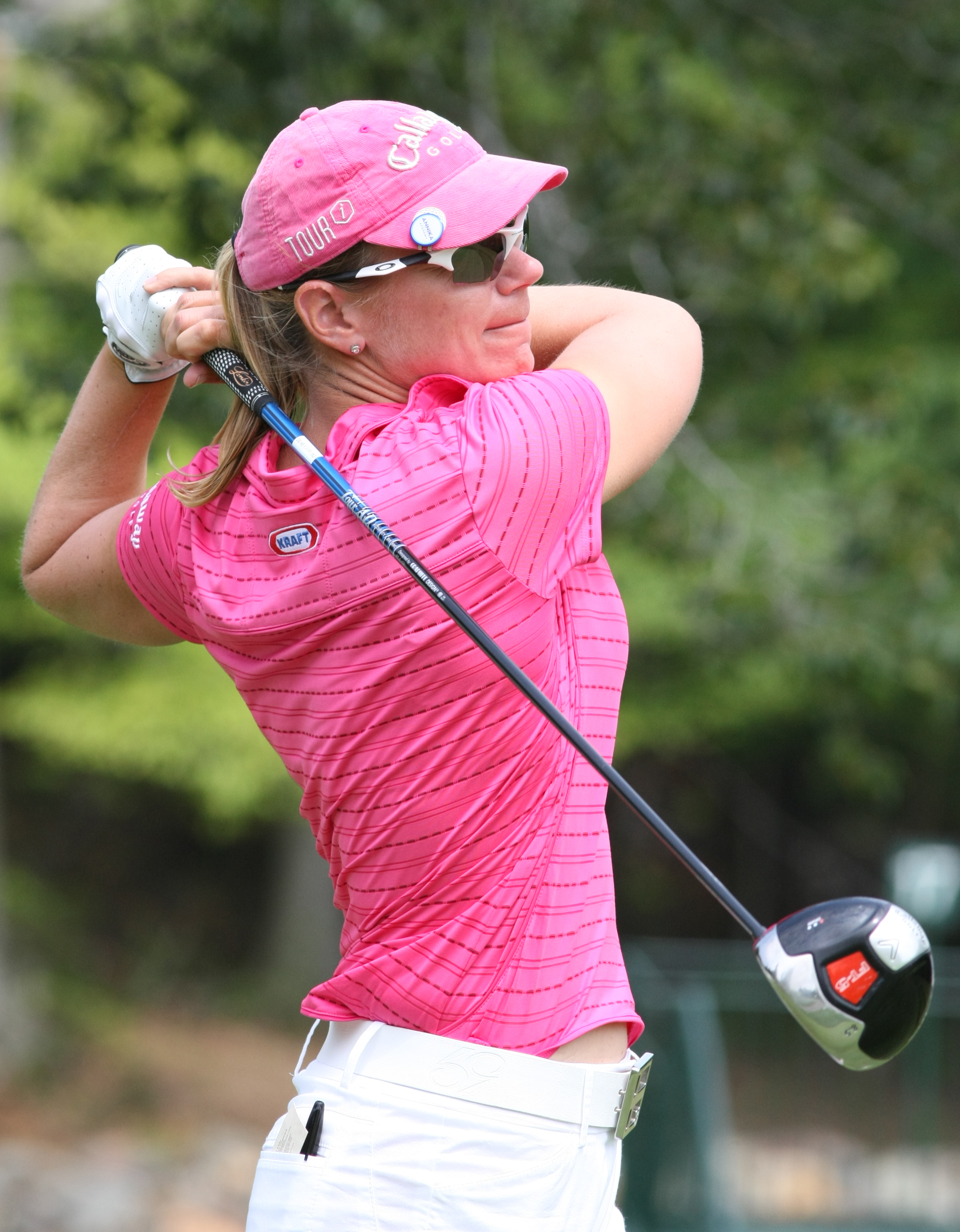 Annika Sörenstam (SWE) during pro-am before 2008 LPGA Championship.